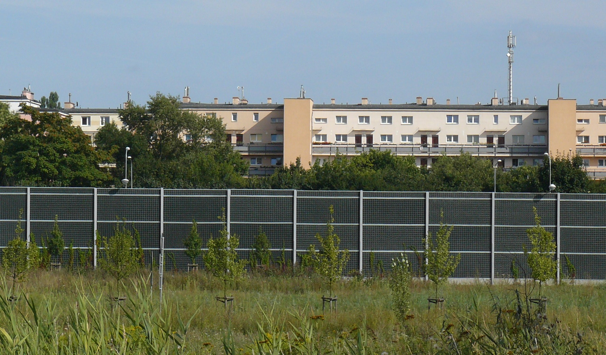 Galeriowce na Zawadach (Poznań).